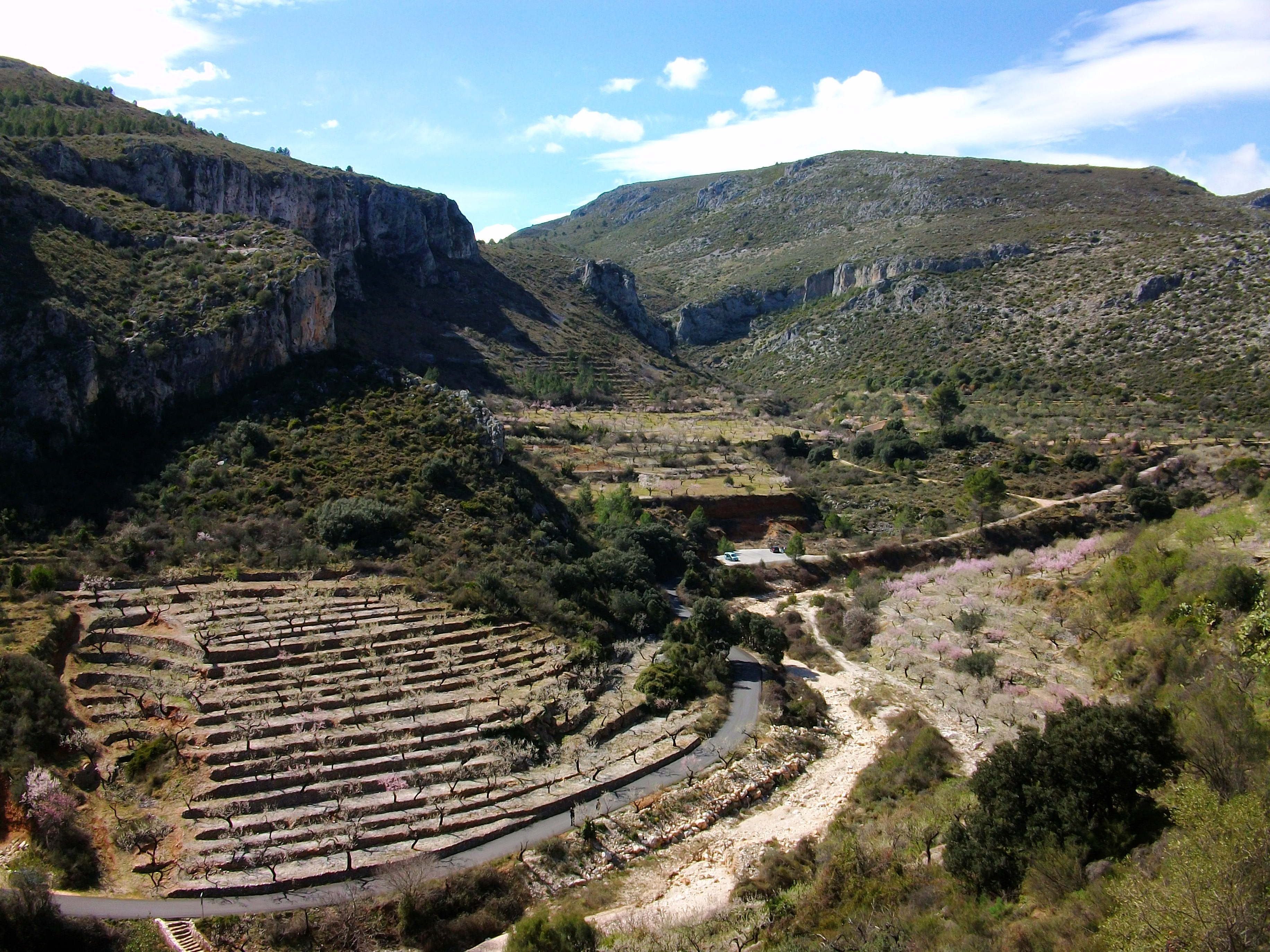 Vista del Pla de Petracos, Castells de Castells (Marina Alta, País Valencià).